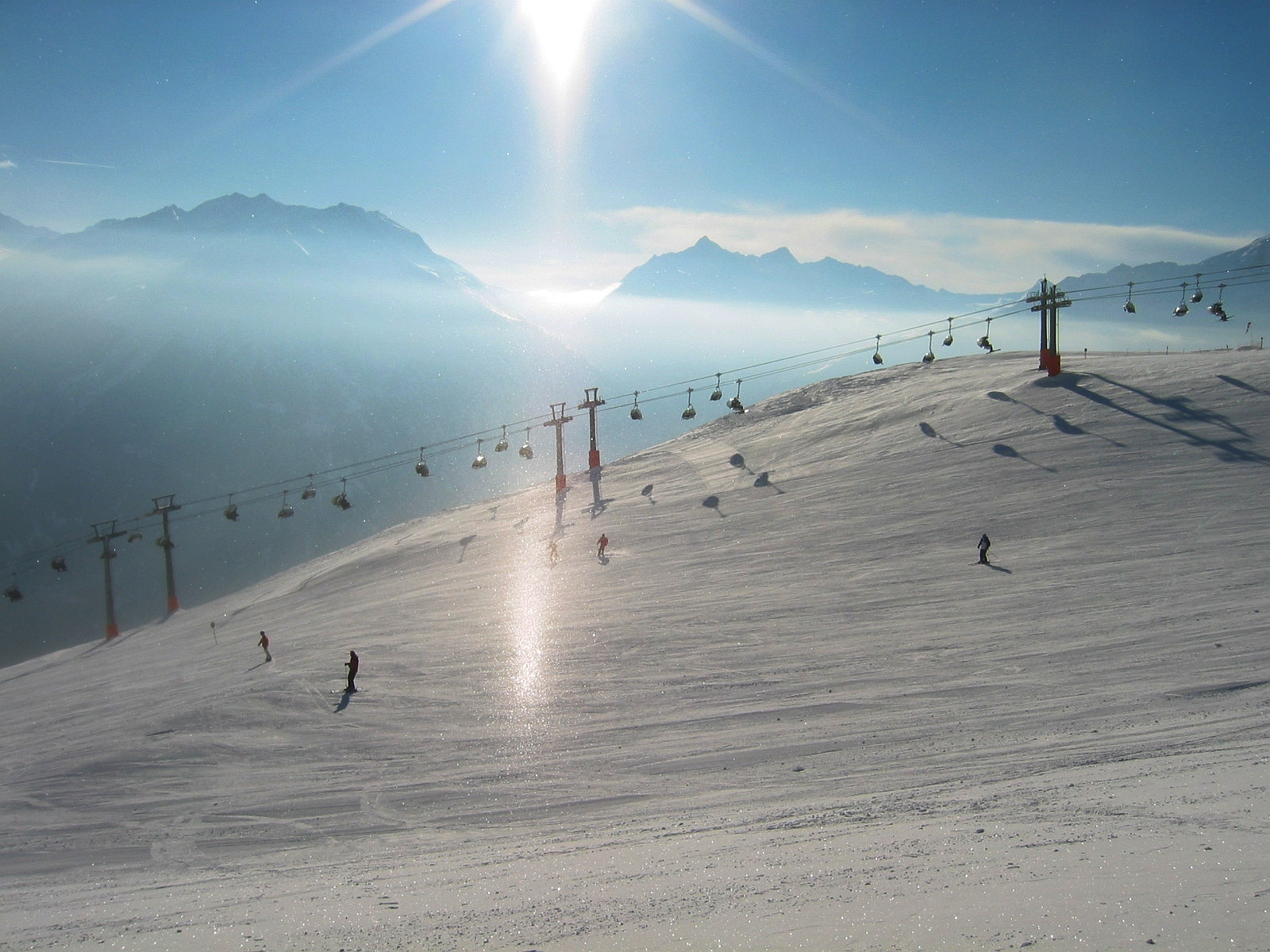 Sölden, Austria, 2005.